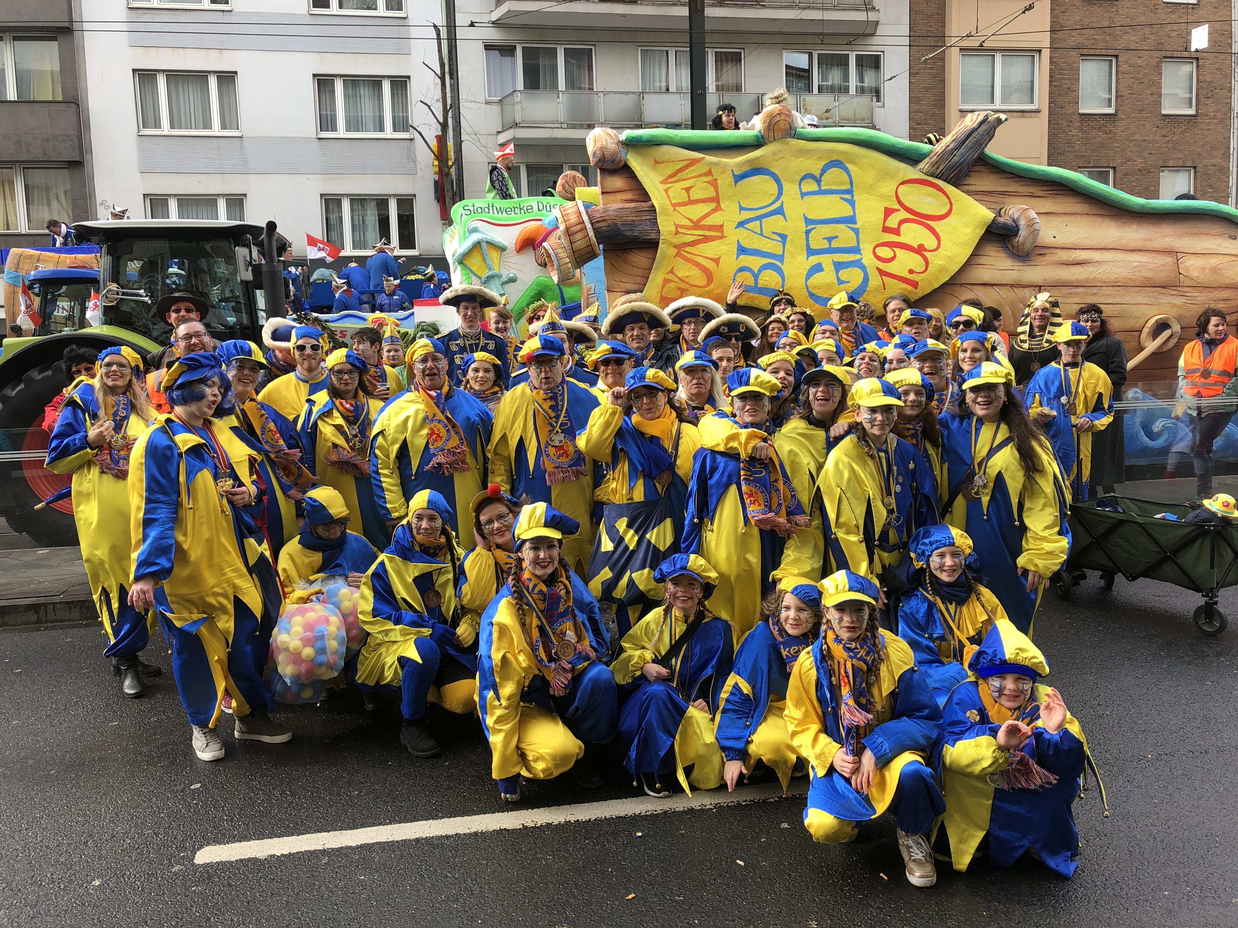 Unterrather Funken, Rosenmontag, Karneval 2019